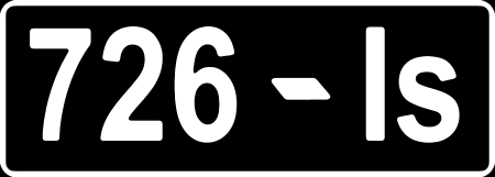 Румынский автомобильный номер 1908-1966 годов